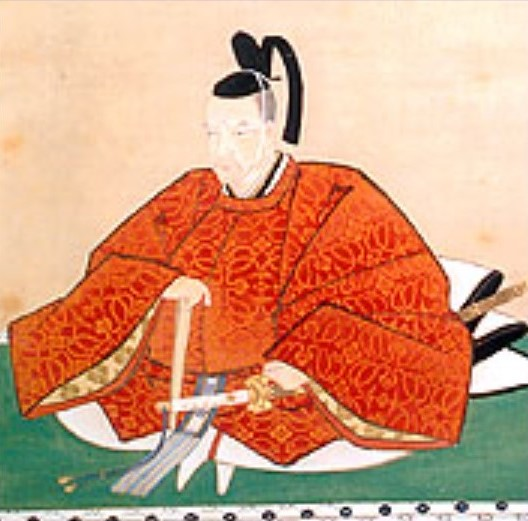 前田直方の肖像。